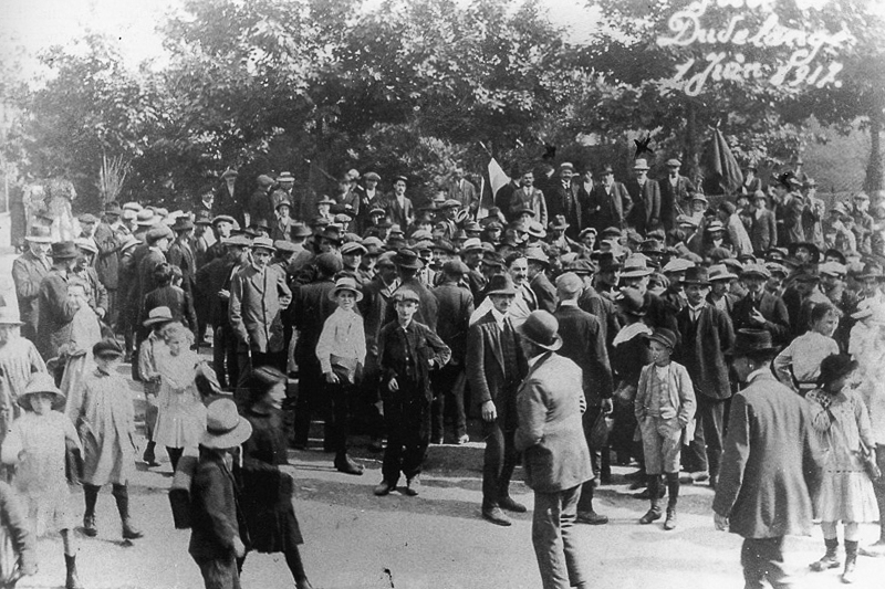 1. Juni 1917: Demonstratioun vun Aarbechter zu Diddeleng. Original caption: "Eines der seltenen Bilder zum Juni-Streik von 1917, hier eine Demonstration in Düdelingen."